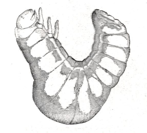 Larve von Scarabaeus sacer, Zeichnung von J. H. Fabre von 1916, Vergilbung entfernt